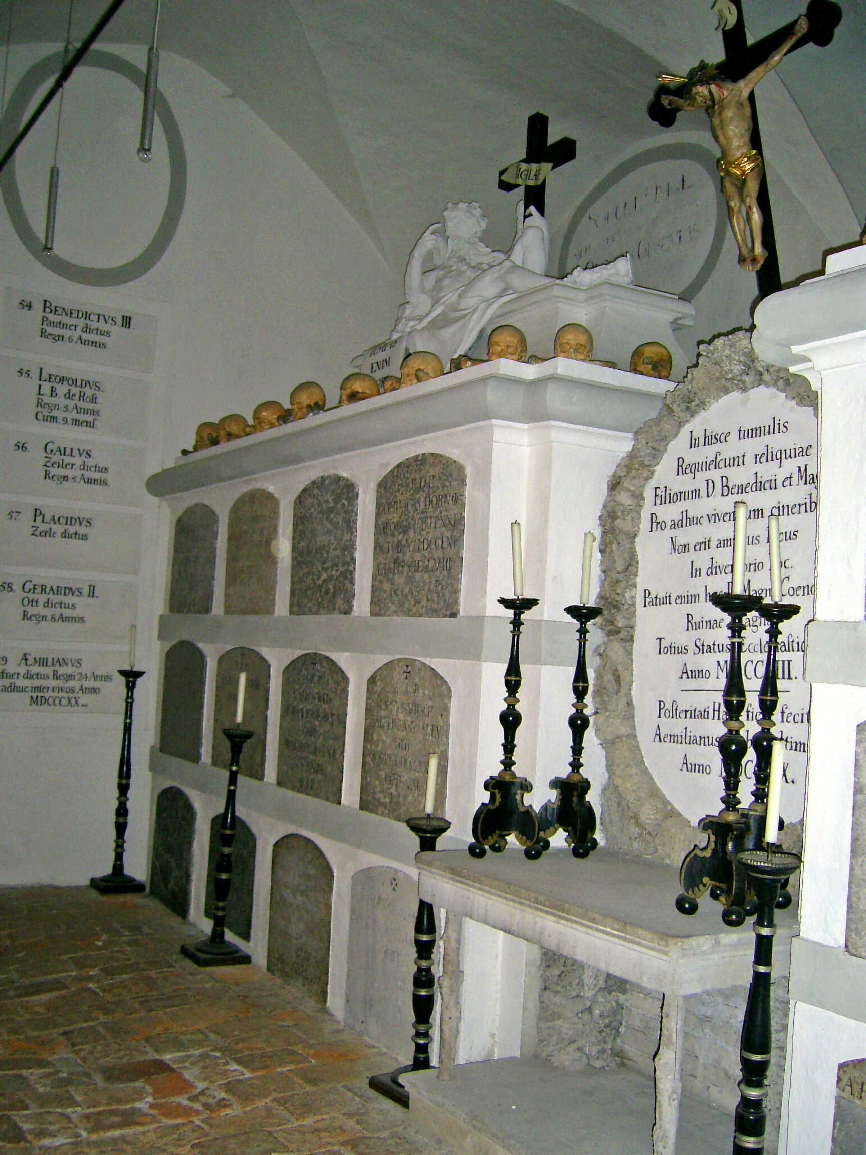 Sankt Mang Füssen